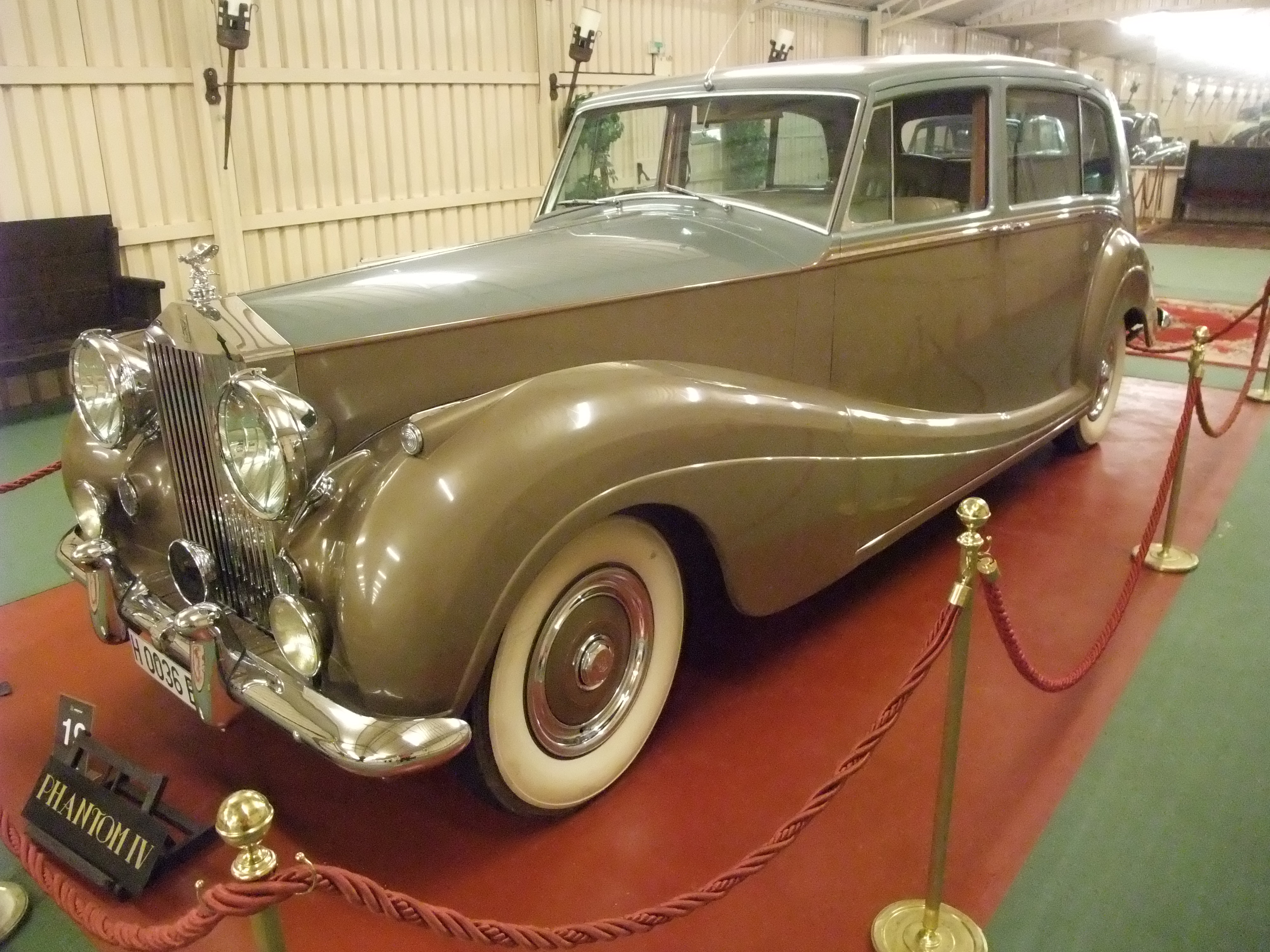 Galdames (Vizcaya)-Museo de coches antiguos-18-Rolls Royce Phantom IV (1954)